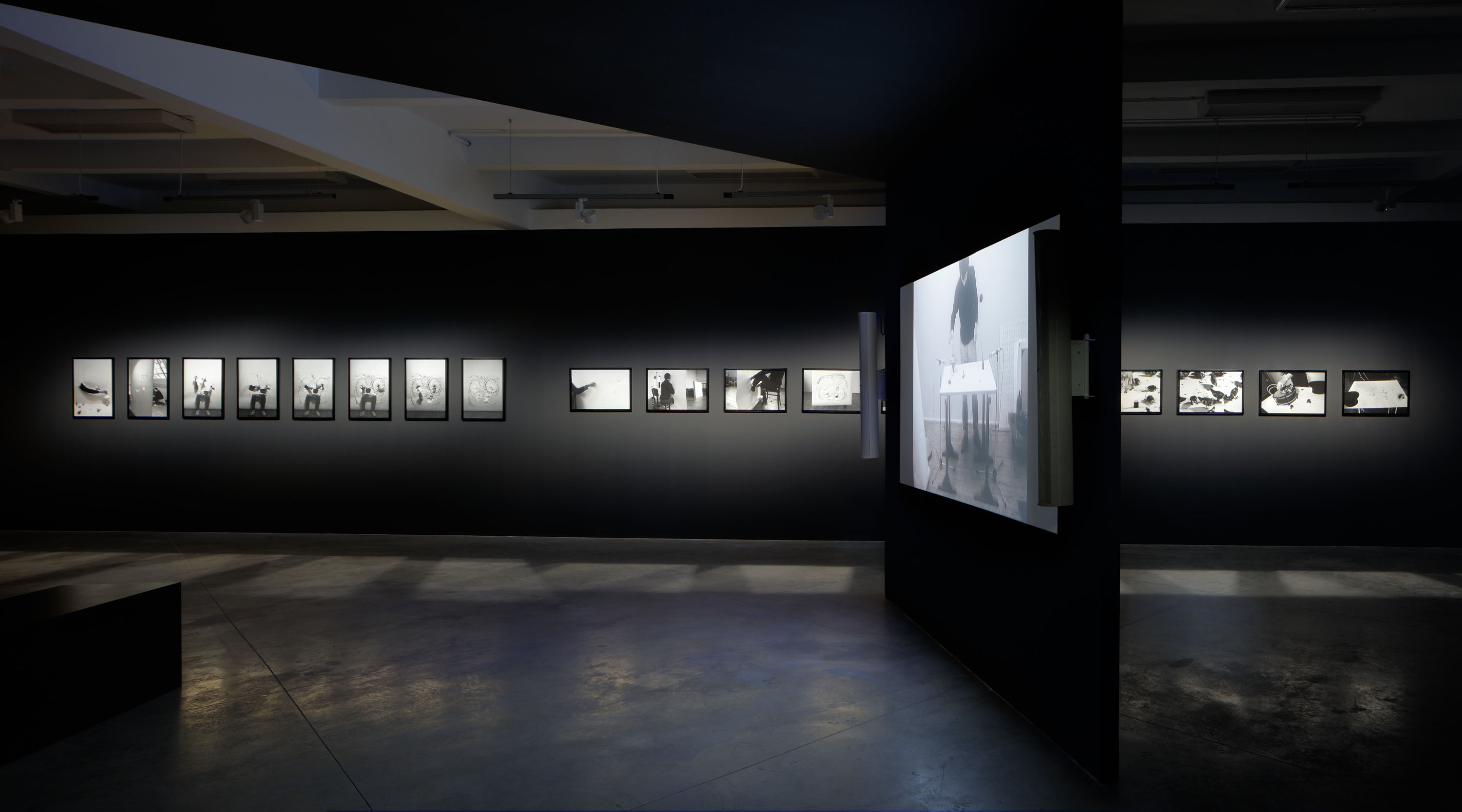 Výstava Milana Grygara Světlo, zvuk, pohyb